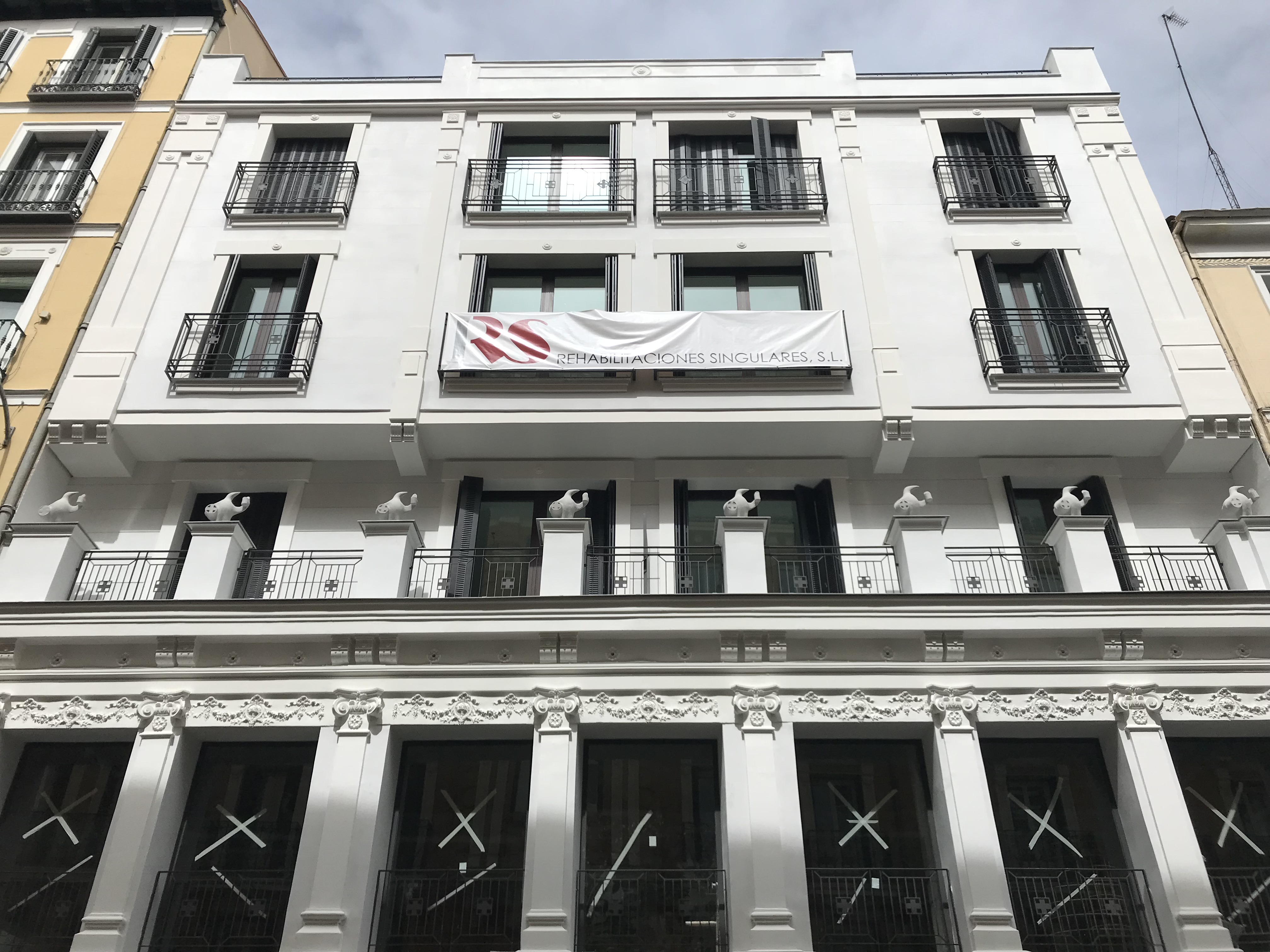 Antiguo almacén para D. Joaquín Ripoll